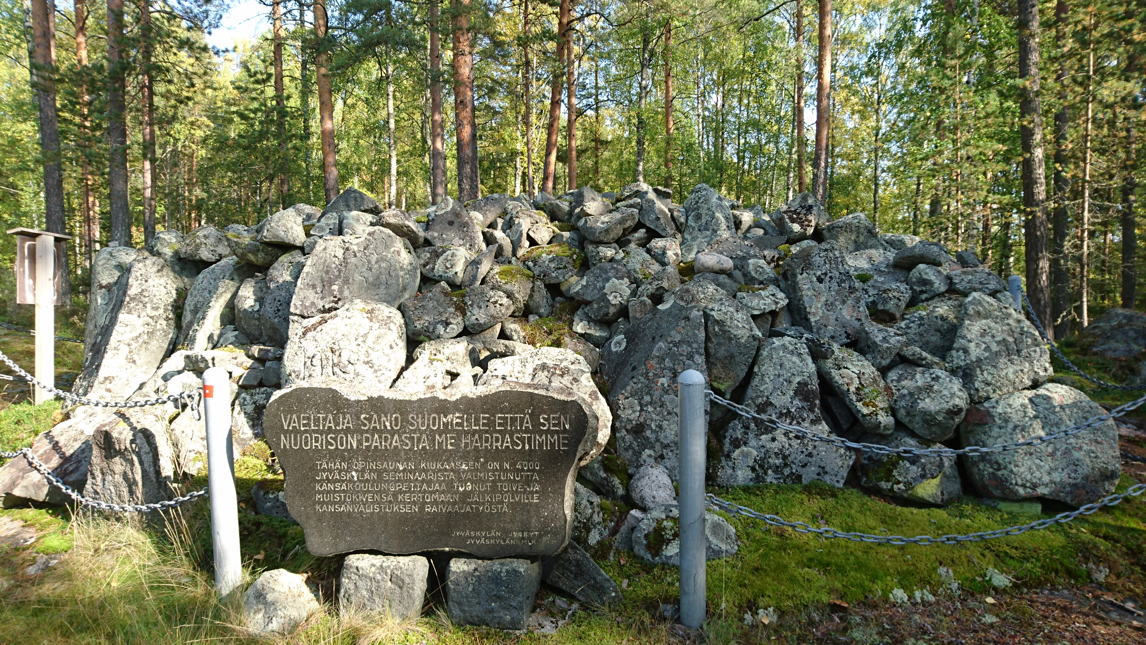 Opinsaunan kiuas; muistomerkki Jyväskylässä